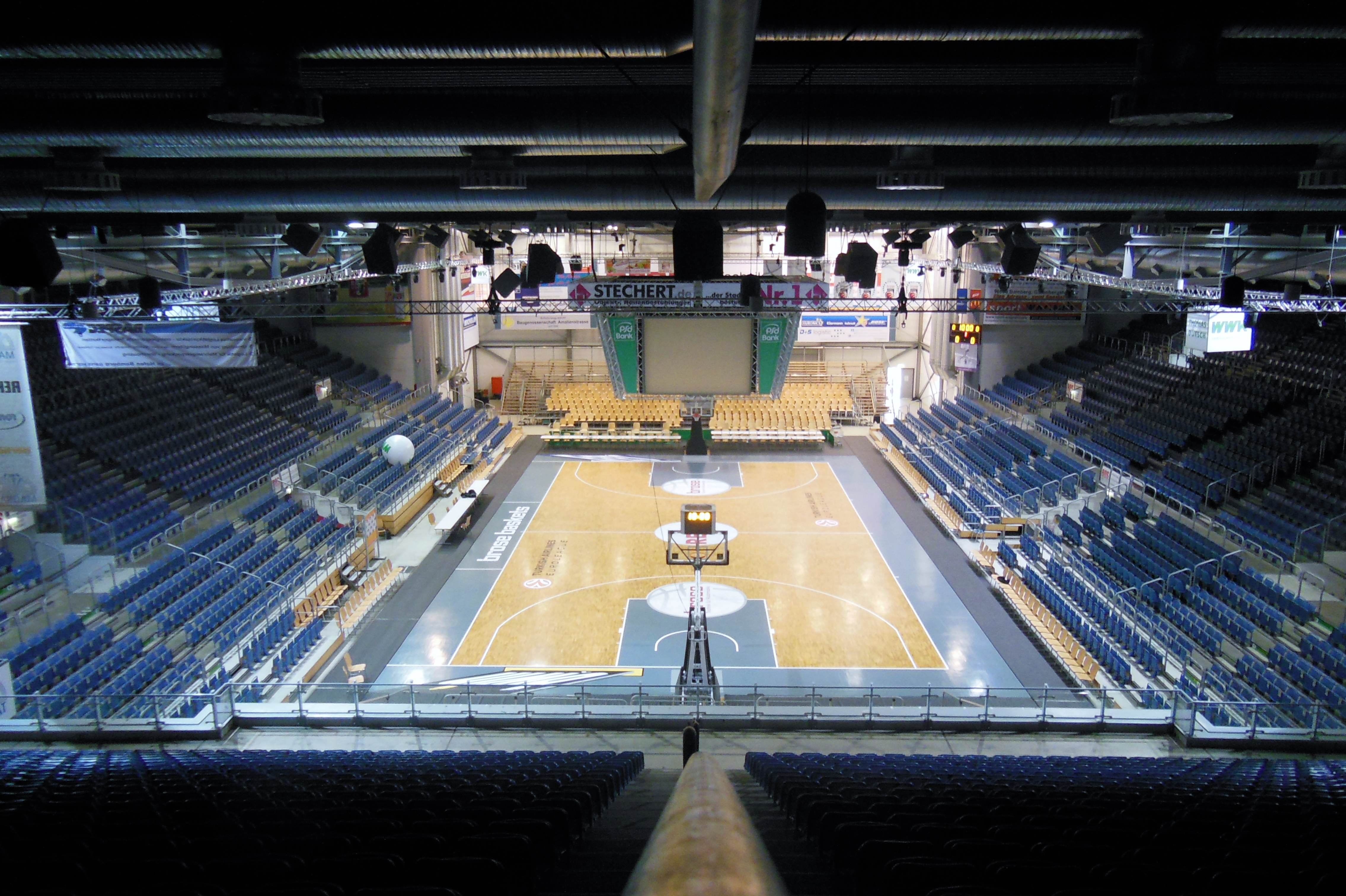 Innenansicht Stechert Arena Bamberg